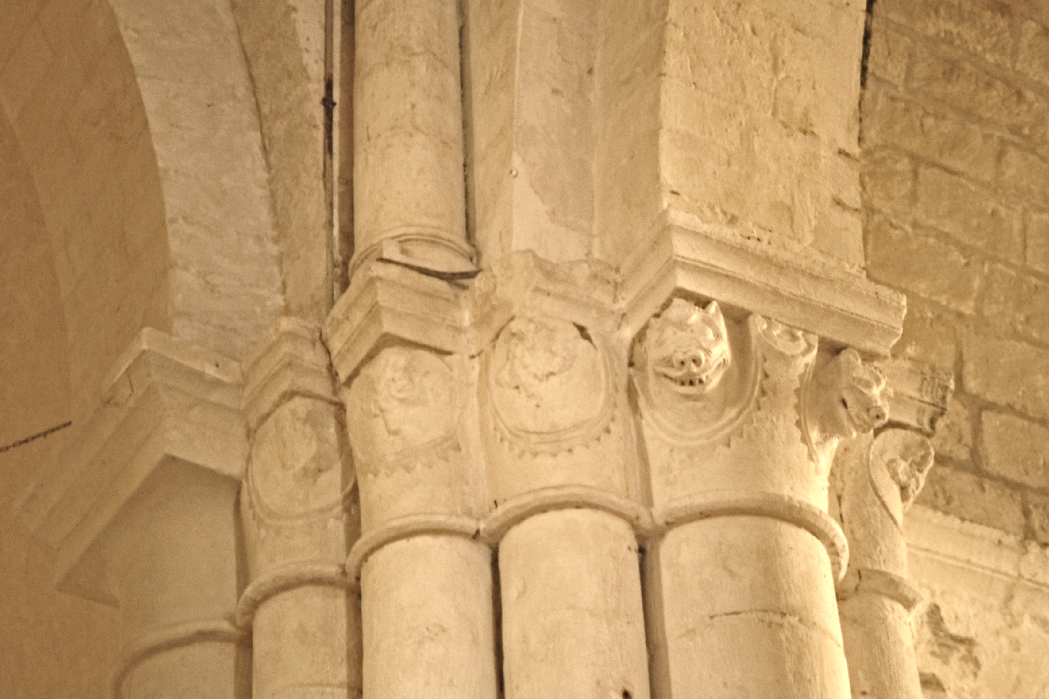 Notre-Dame Corme-Écluse, Vierungspfeilerbündel